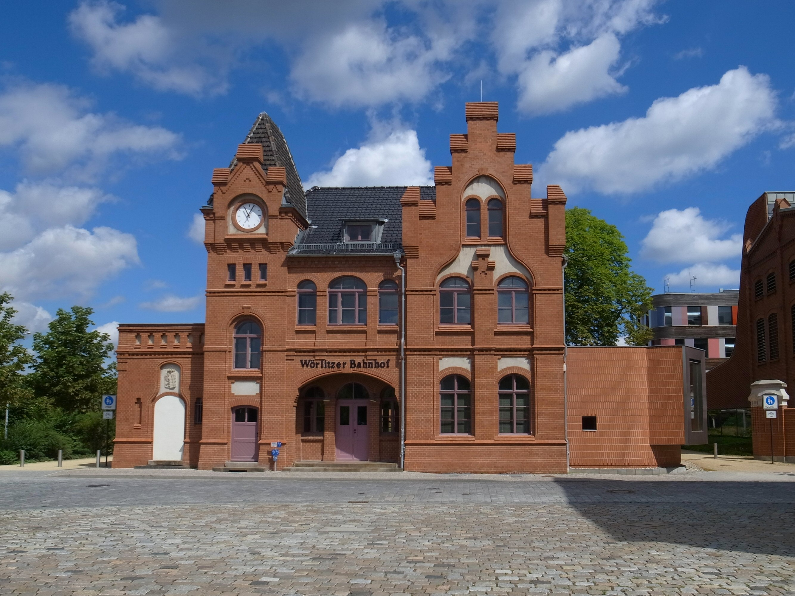 Dessau-Roßlau, Empfangsgebäude der Dessau-Wörlitzer-Eisenbahn (Baudenkmal im Denkmalverzeichniss Sachsen-Anhalt, Erfassungsnummer: 094 40717 000 000 000 000 [1])